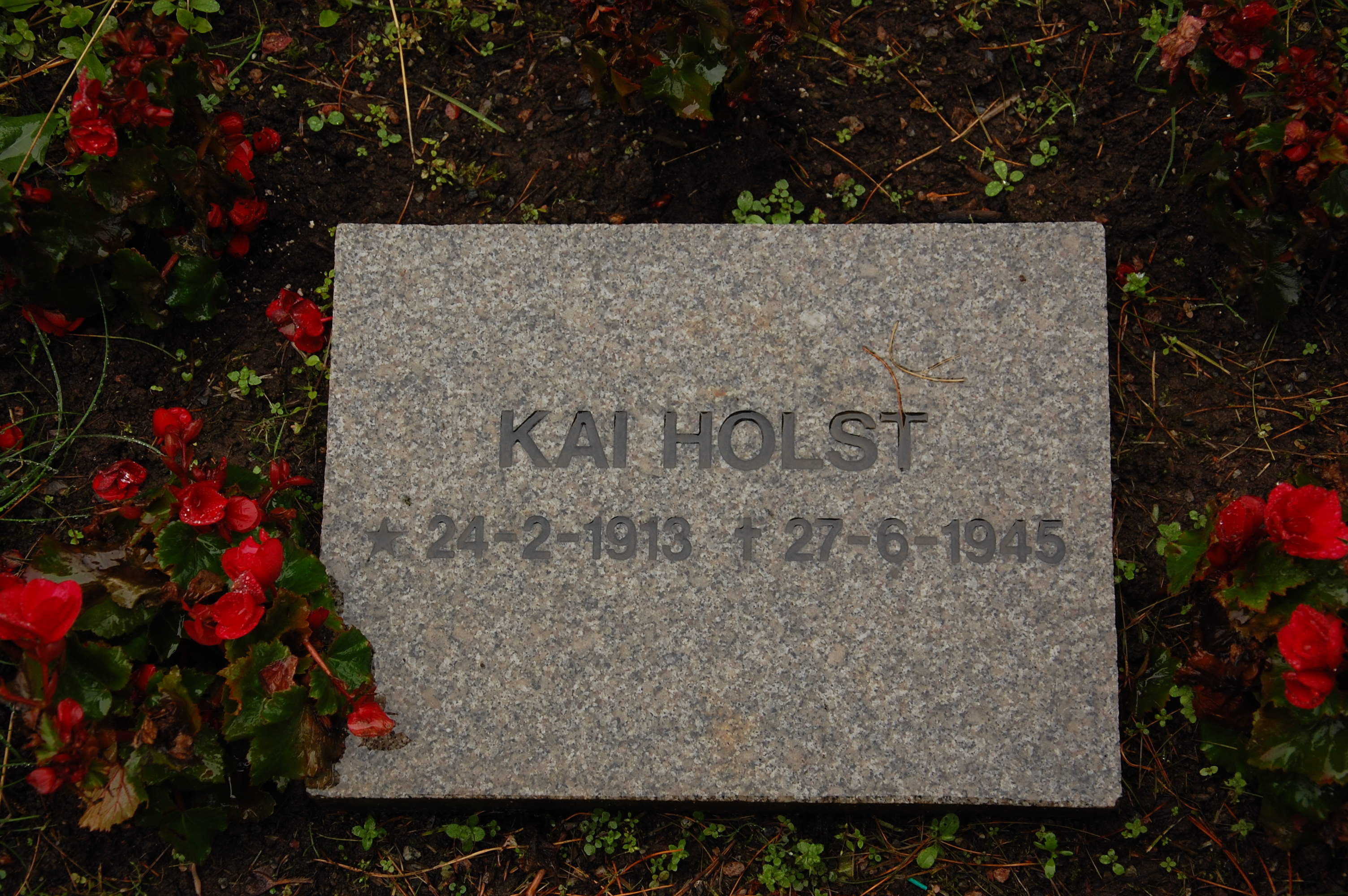 Kai Holsts gravsted på Vestre gravlund i Oslo / Gravestone of Kai Holst